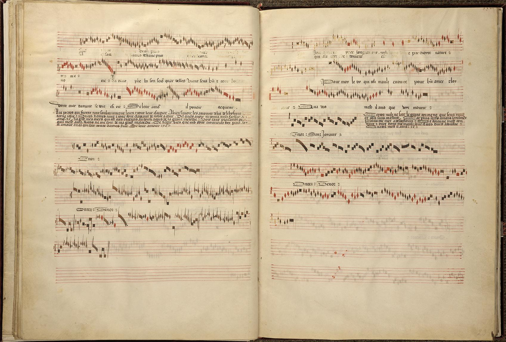 Codex Chantilly